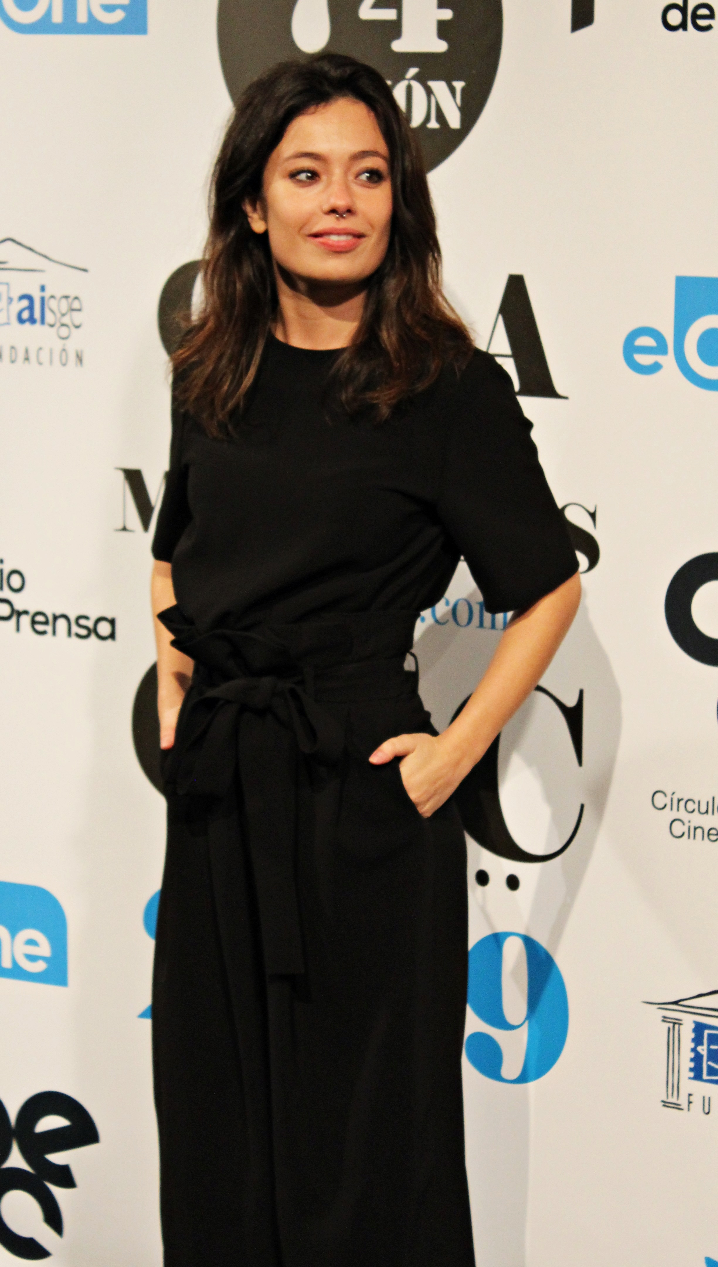 La actriz española Anna Castillo en la 74 edición de las Medallas del Círculo de Escritores Cinematográficos.